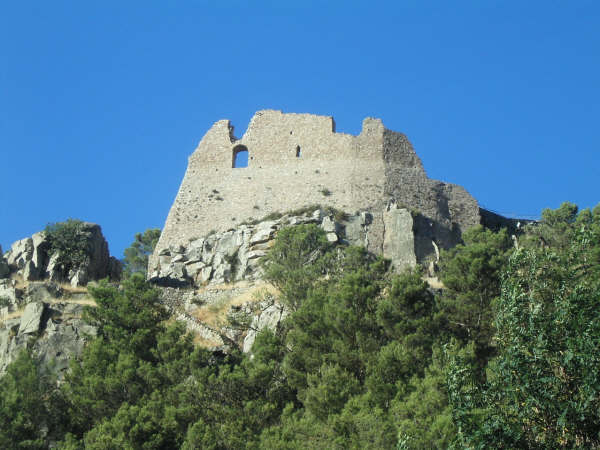 Il castello di Geraci siculo e la rocca